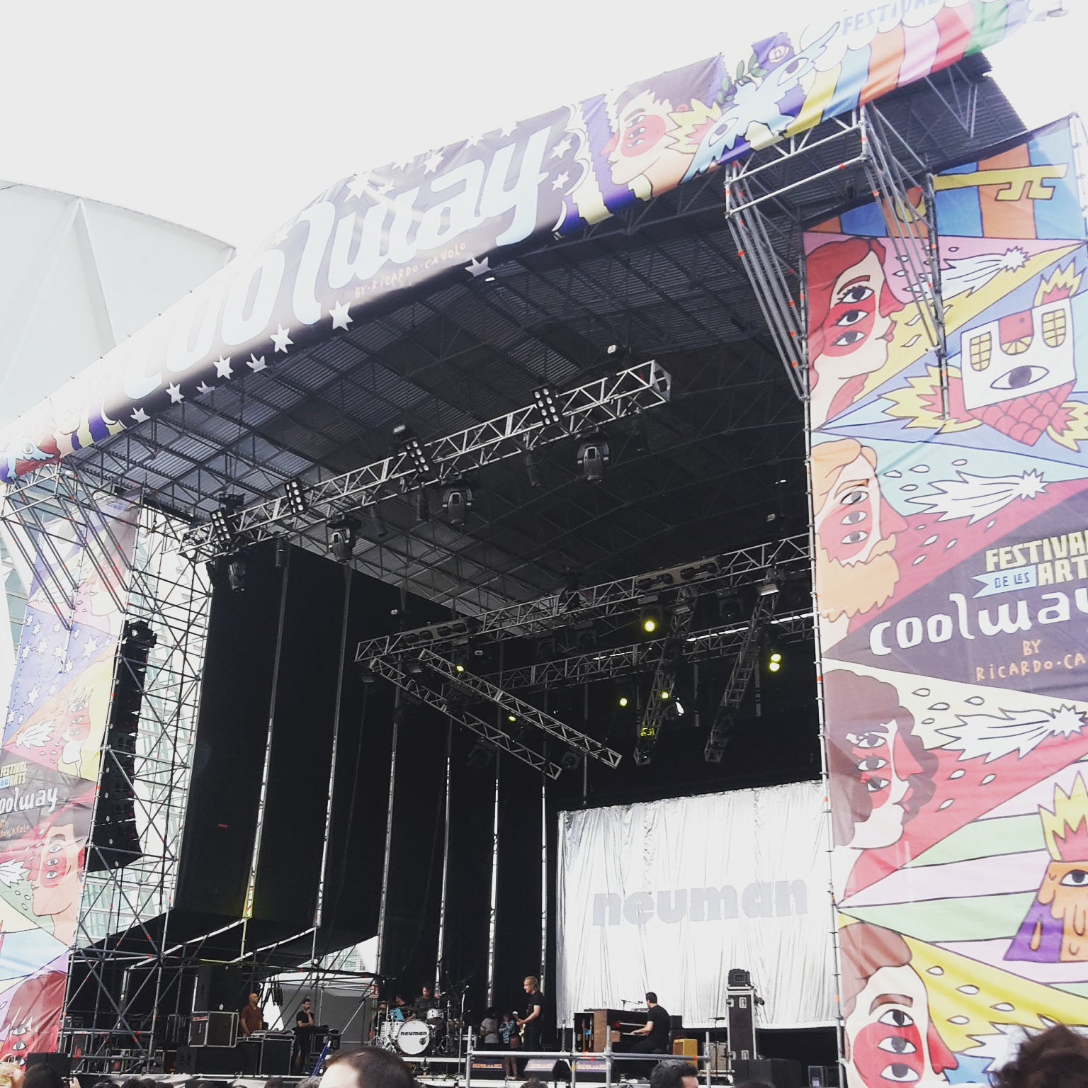 Neuman en el escenario Coolway del Festival de les Arts Vol2.